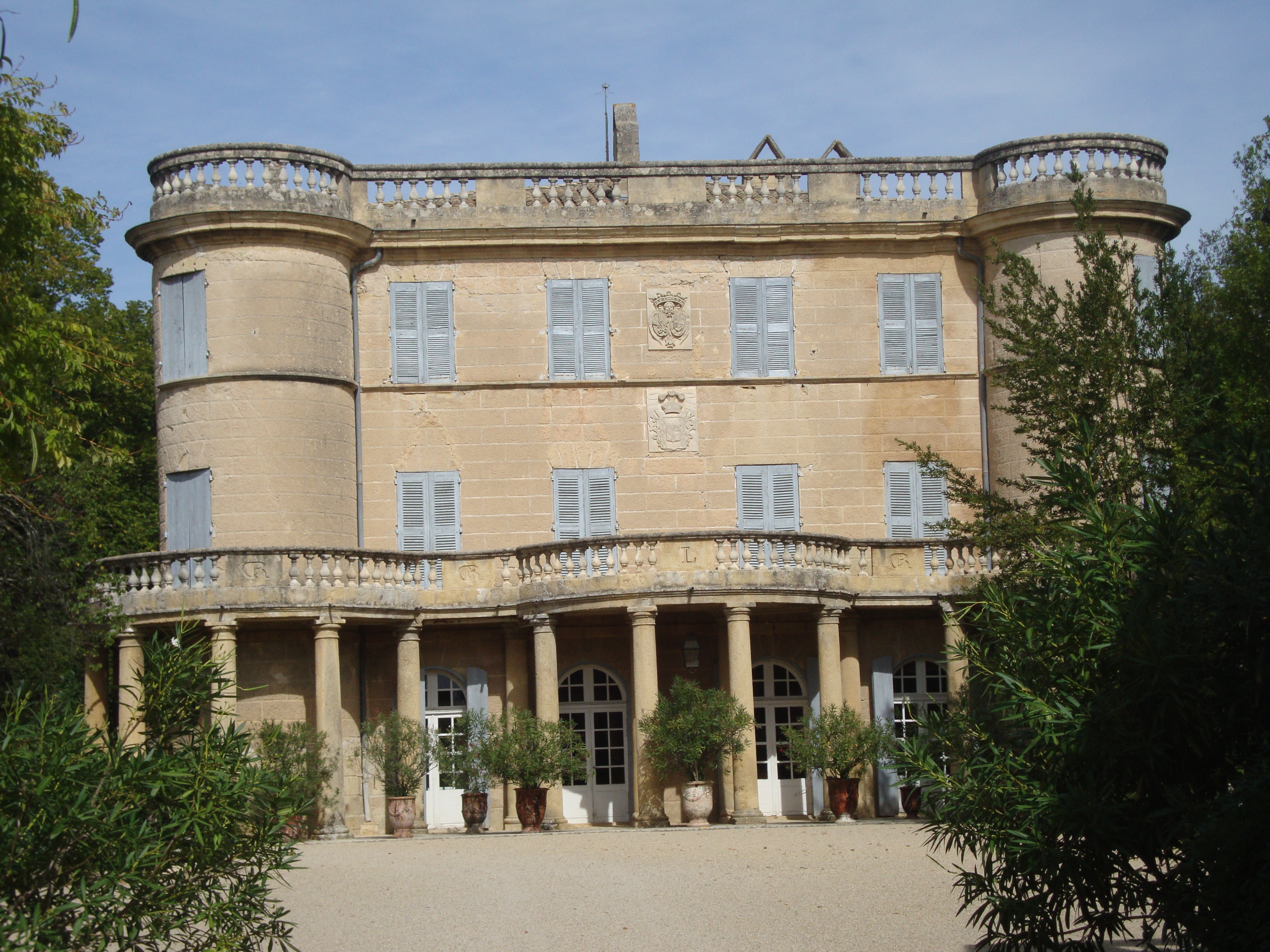 Château de Castille, (ClasséInscrit, 19832006)